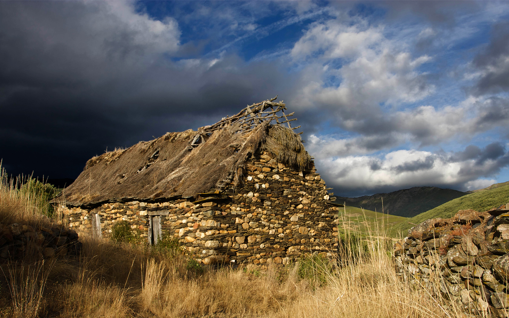 Casa de teito de Corporales en la comarca leonesa de La Cabrera.